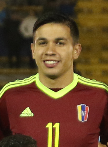 Quito, 2 feb (Andes).- La selección juvenil de Venezuela goleó 4-2 este jueves a su par de Ecuador, que comprometió seriamente sus opciones de clasificar al Campeonato Mundial Sub 20 Corea del Sur 2017, que se desarrollará en mayo próximo. ANDES/Micaela Ayala V.